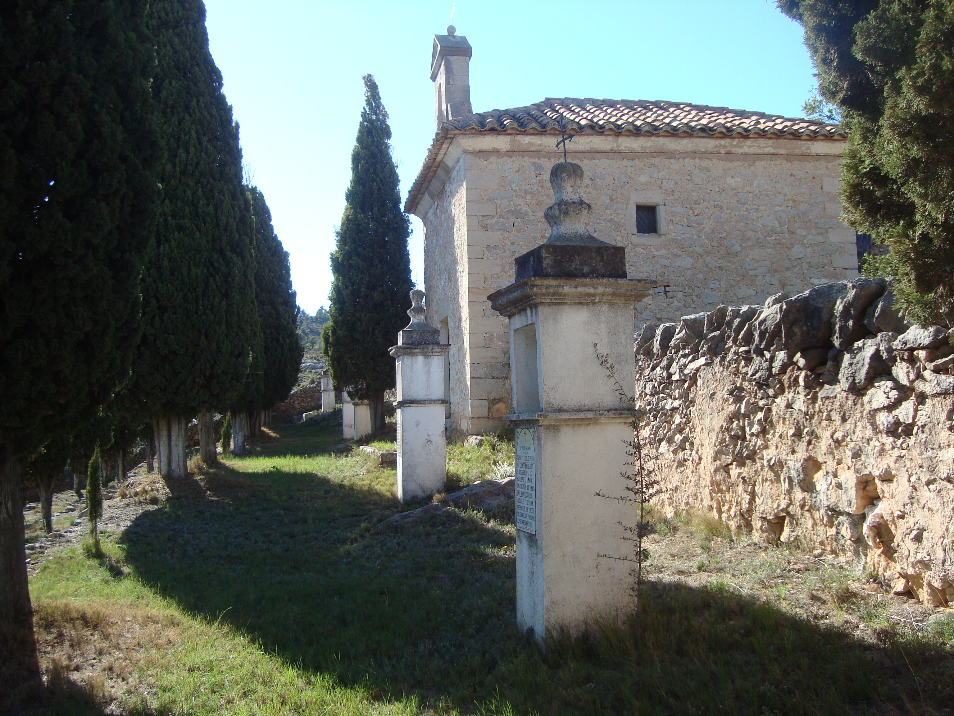 Calvari (Sucaina) 08.142-004.